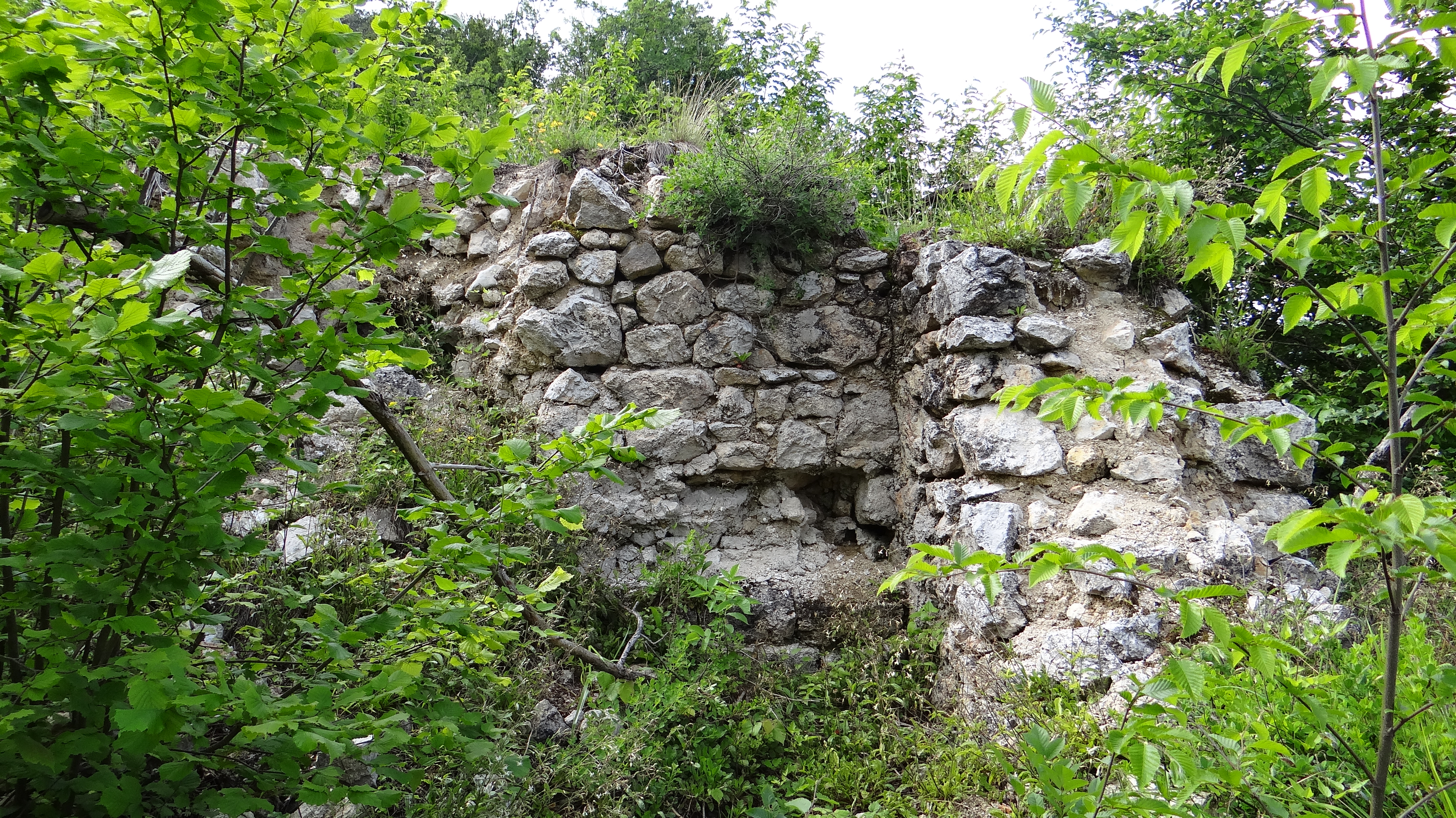 Ruševina gradu Kozje 2013